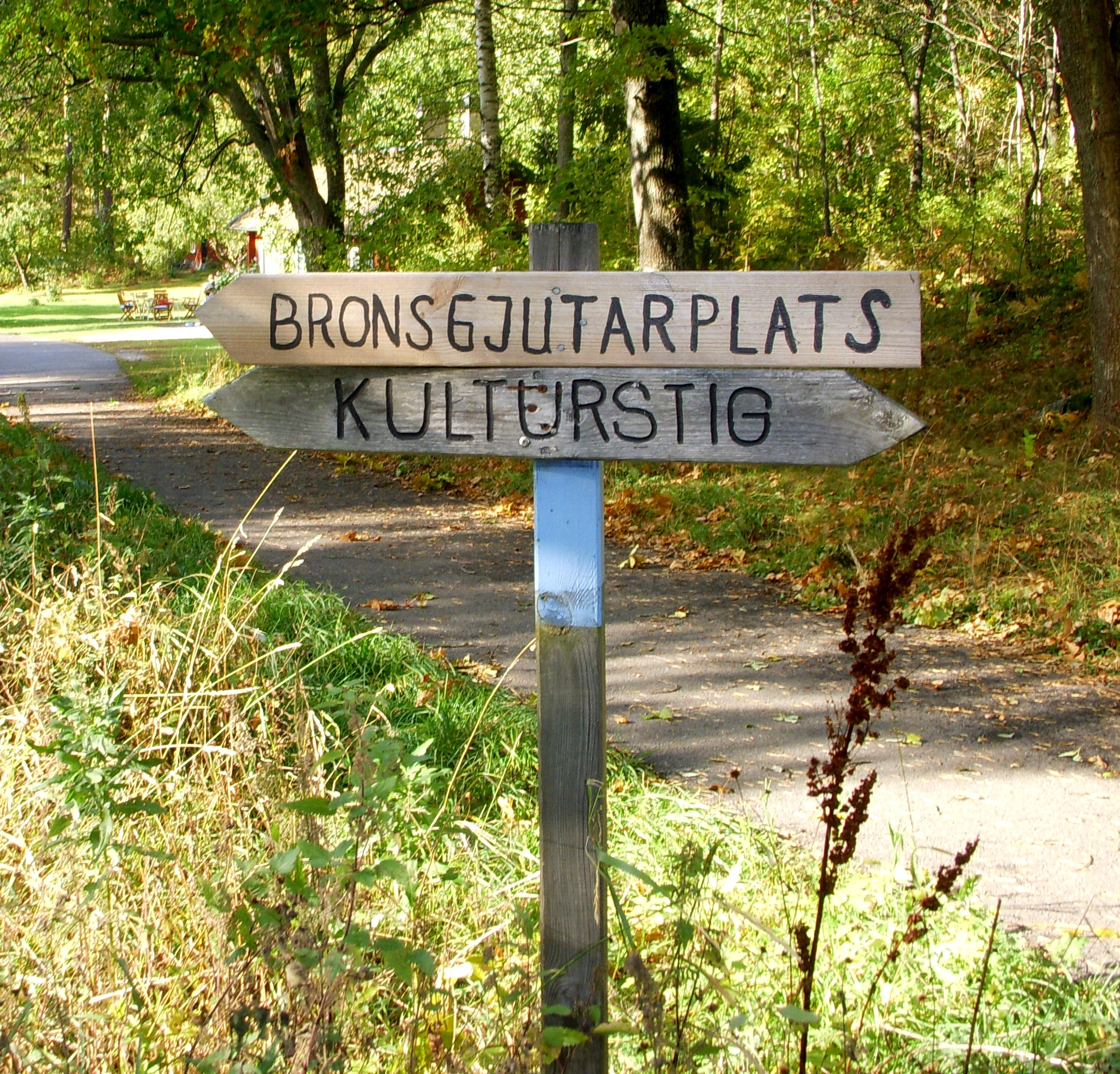 Hallunda kulturstig i Botkyrka, skylt